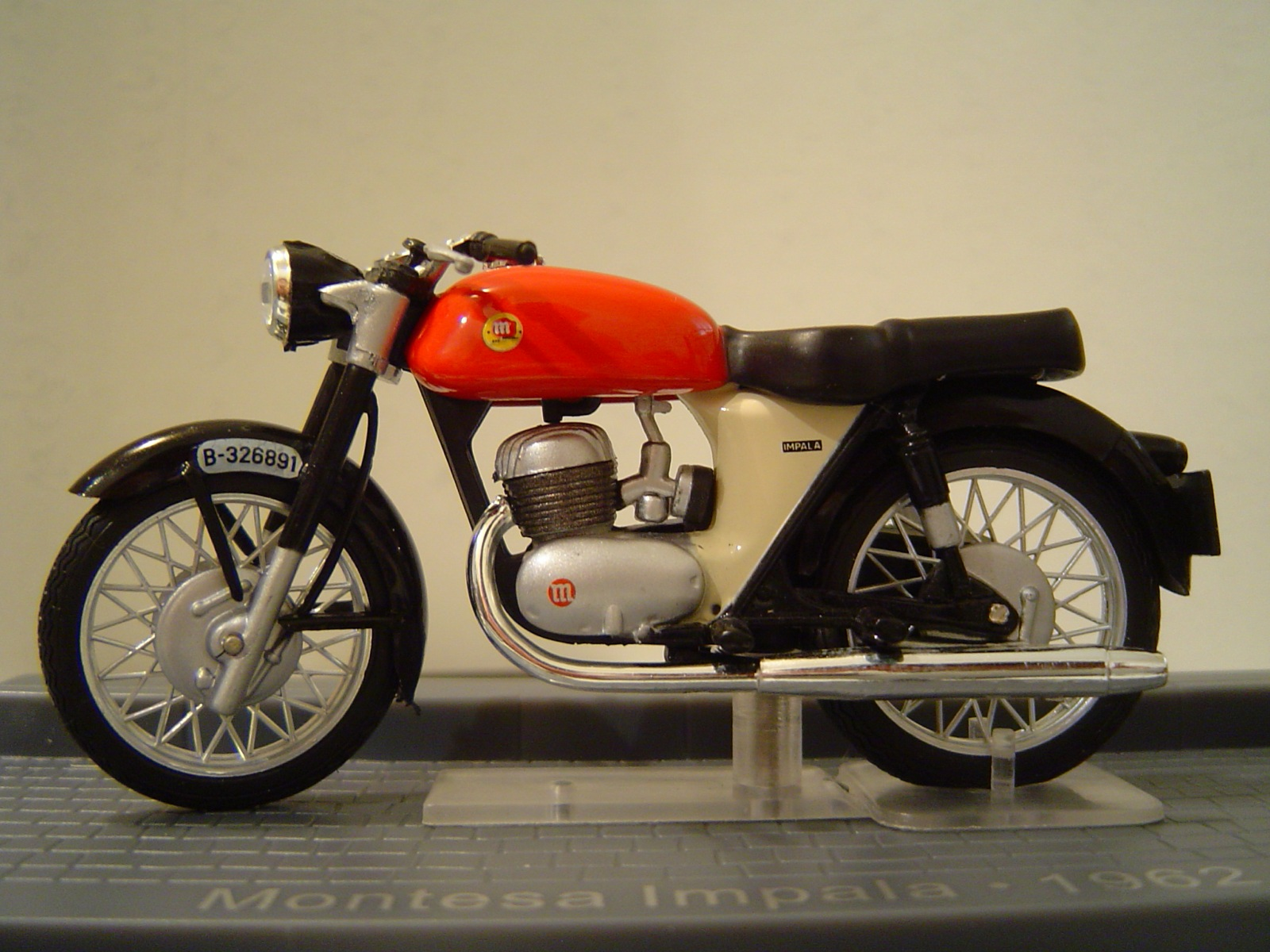 Montesa Impala 1962 (model)